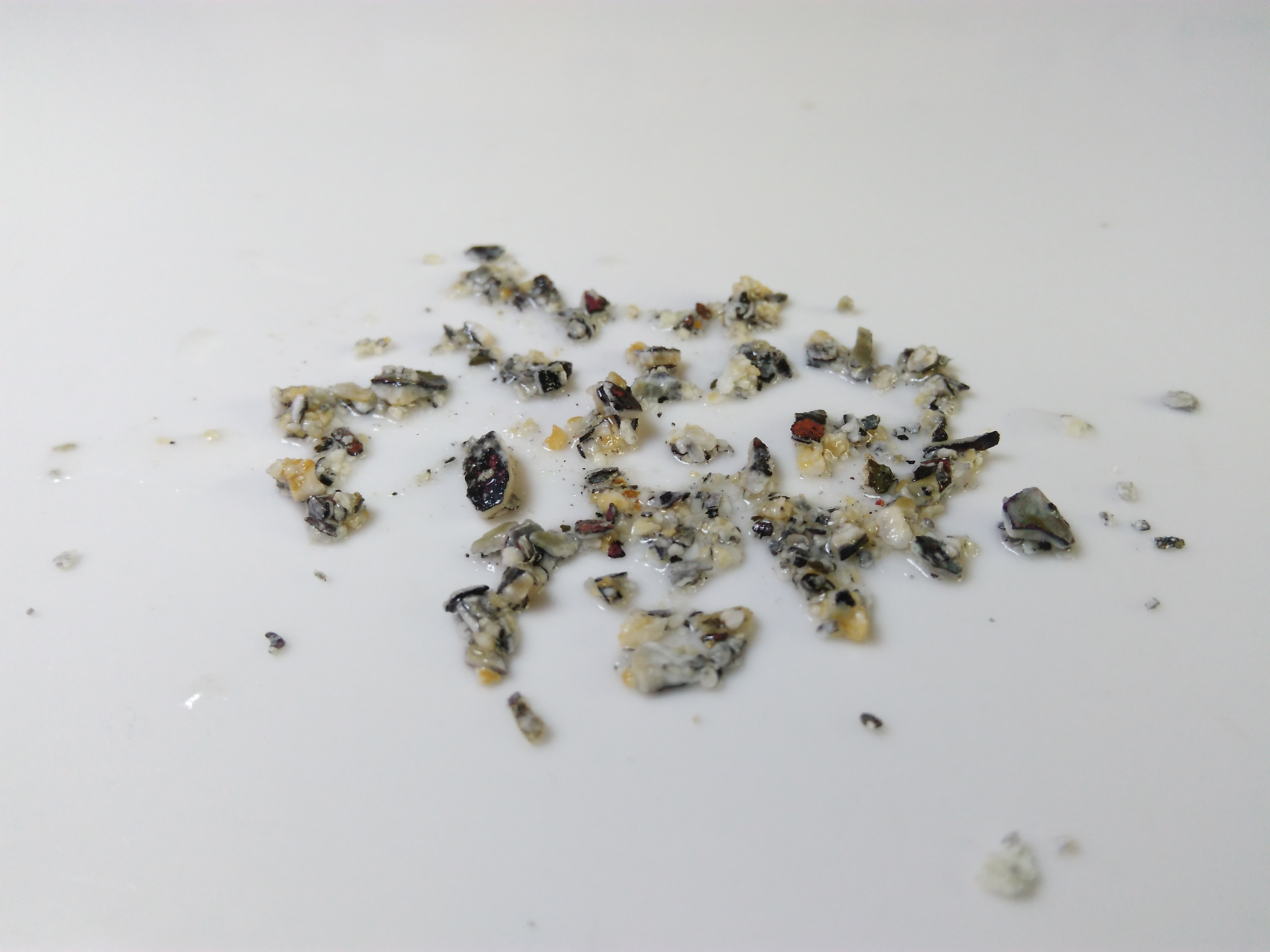 Una muestra de nitratos y carbonatos presentes en el agua potable de la sanitaria SMAPA, que abarca las comunas de Maipú, Cerrillos y Estación Central, en la ciudad de Santiago de Chile.